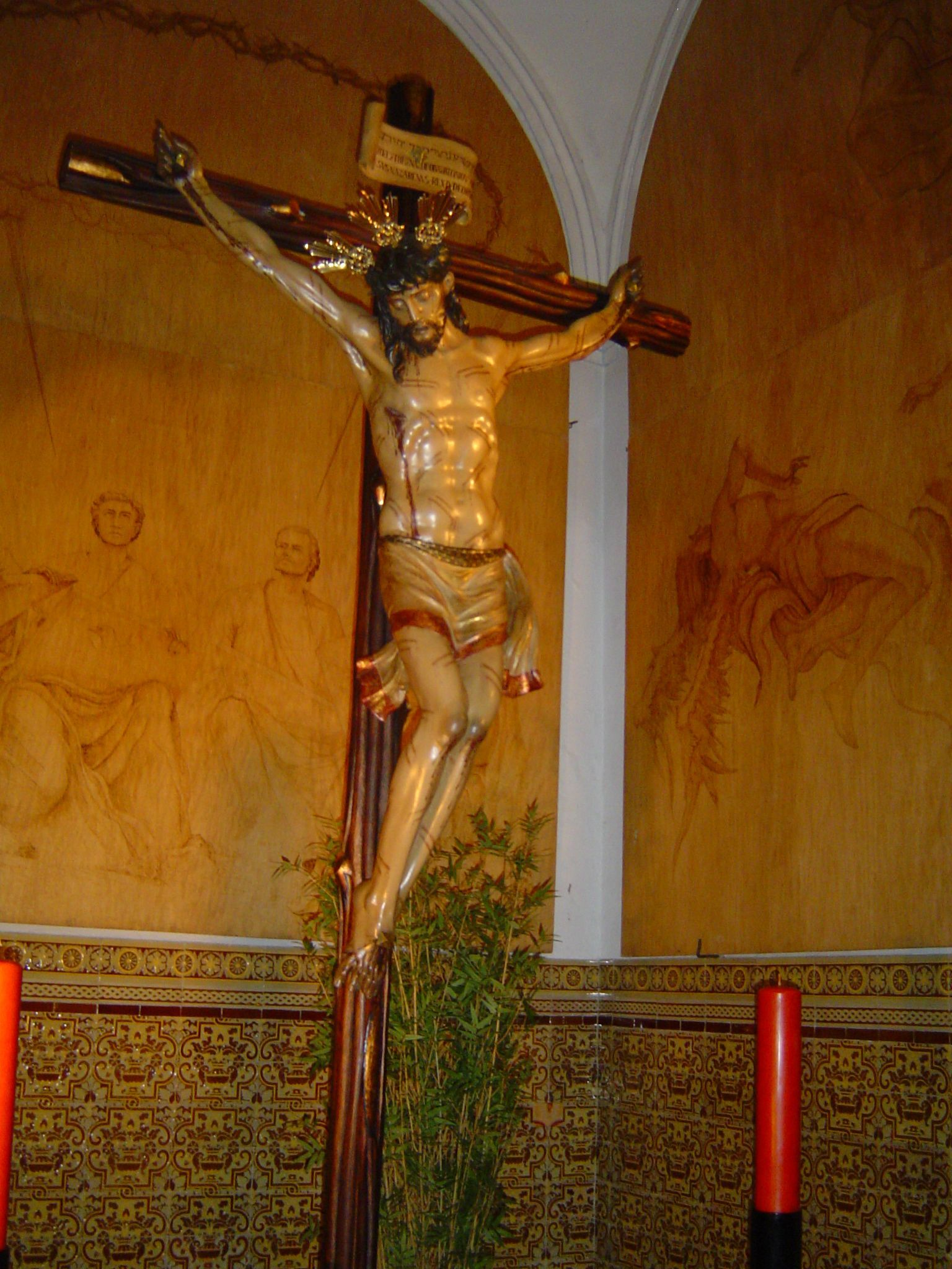 Cristo de las Misericordias en su Capilla de la Iglesia del Monasterio de Santa Clara de Jaén